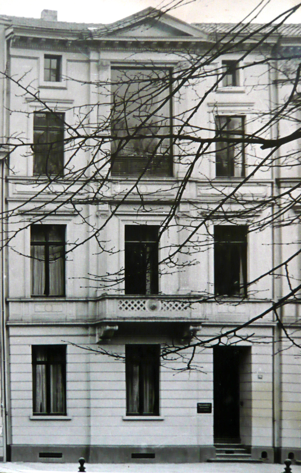 Haus Goltsteinstraße 23 in Düsseldorf, seit 1878 das Eigentum von Karl Rudolf Sohn und seiner Frau Else Sohn-Rethel und Geburtshaus von Alfred, Otto, Karli und Mira Sohn-Rethel, wurde 1943 durch eine Brandbombe zerstört